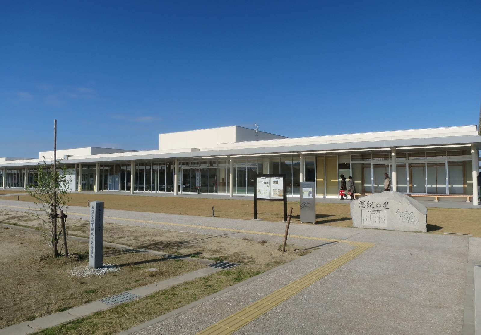 岡崎市地域交流センター六ツ美分館・悠紀の里